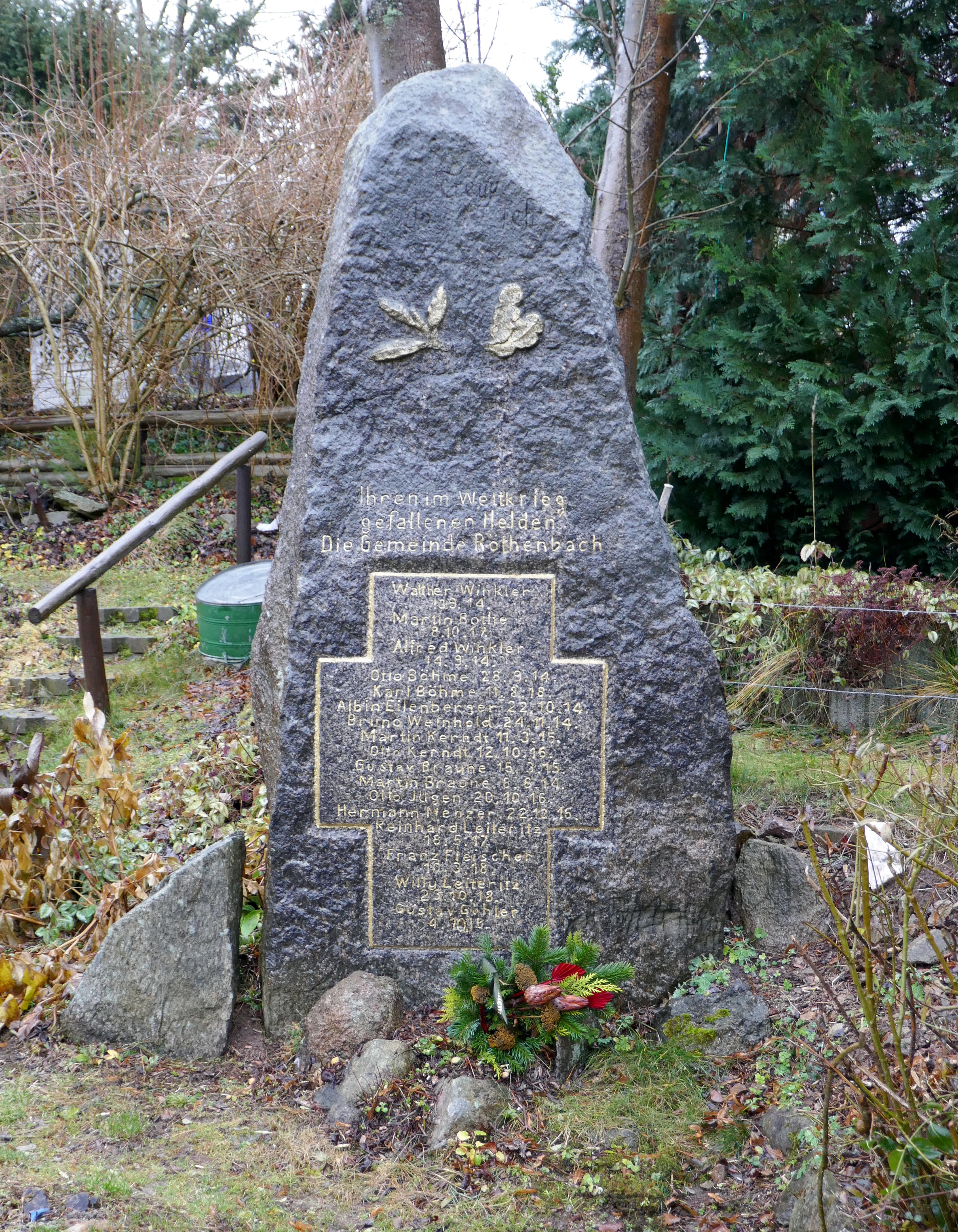 Kriegerdenkmal 1. Weltkrieg, Bergstraße 2 (gegenüber), Röthenbach (Klingenberg), Landkreis Sächsische Schweiz-Osterzgebirge - Sachsen.